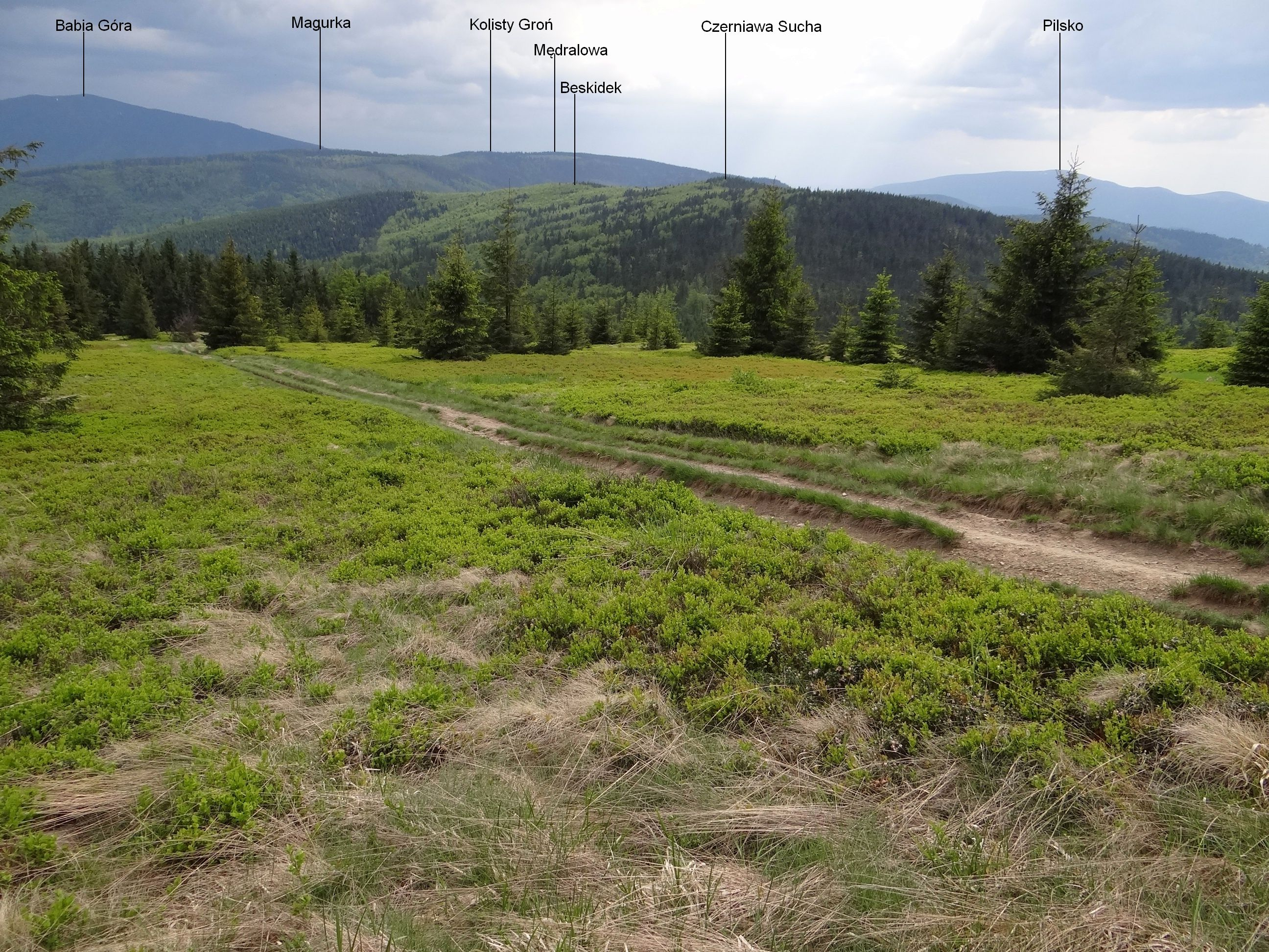 Hala Trzebuńska na Jałowcu w Paśmie Jałowieckim. Widok na Babią górę, Mędralową i Czerniawę Suchą